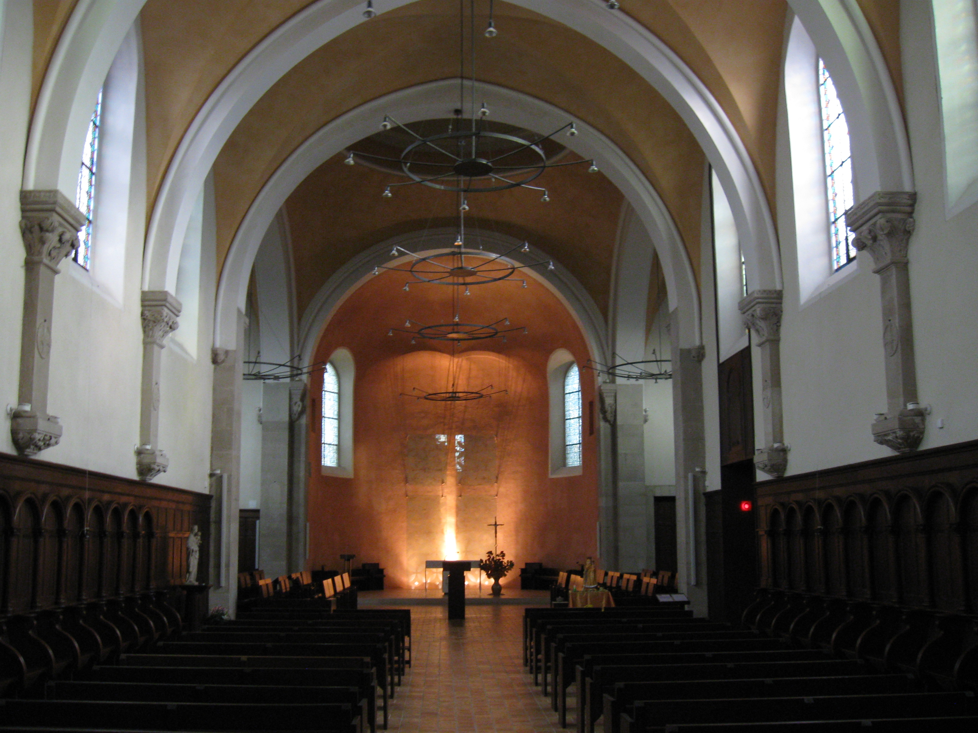 Église abbatiale de Jouarre. (Seine-et-Marne, région Île-de-France).